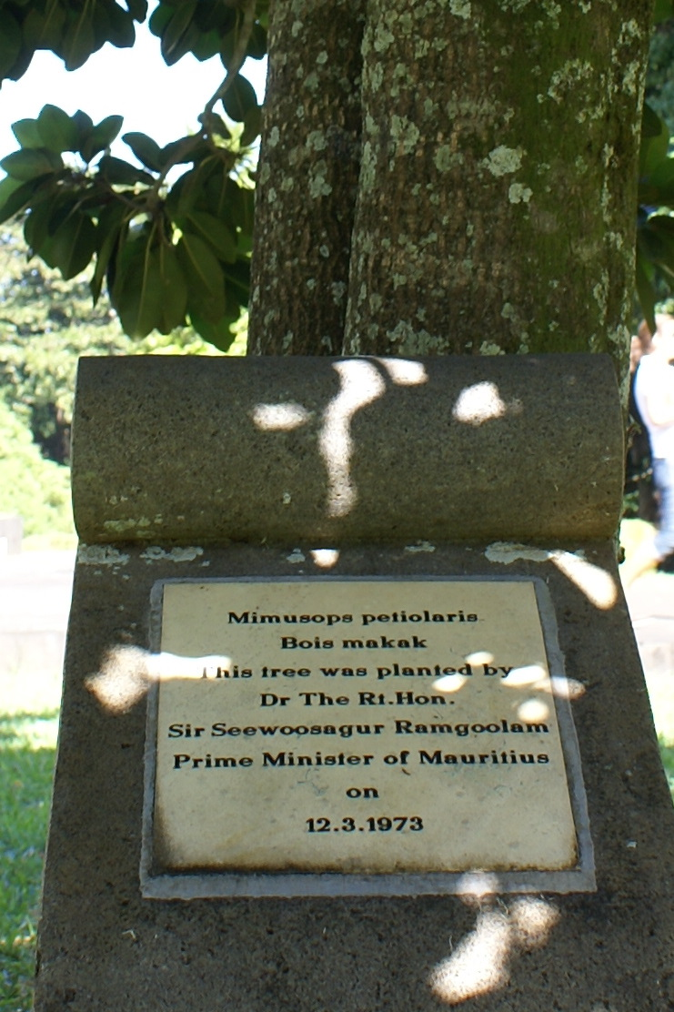 Mimusops petiolaris (Bois makak), individu planté au Jardin de pamplemousses à l'île Maurice : stèle commémorative de la cérémonie de plantation